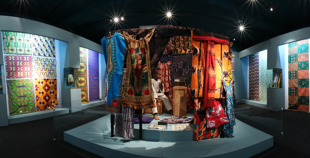 "Afrika im Gewand - Textile Kreationen in bunter Vielfalt", Ausstellung Museum der Völker, 1. Oktober bis 20. November 2016